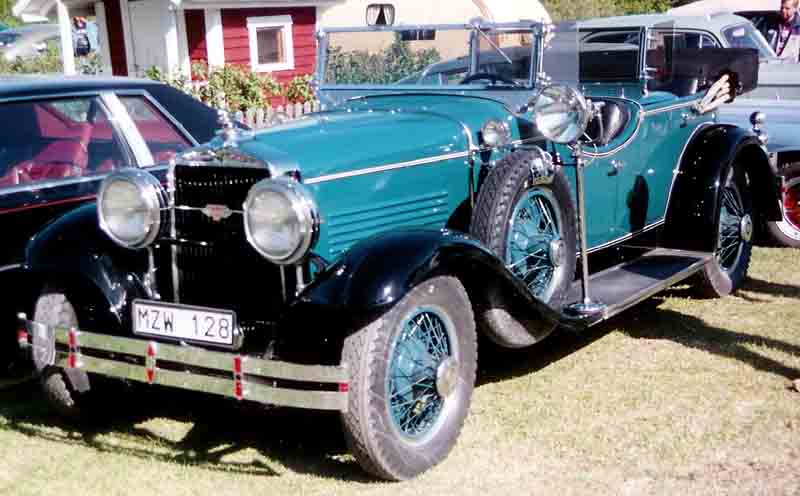 Stutz Blackhawk Model L-8 Speedster 4-Passenger 1929